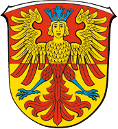 Wappen von Mücke (Gemeinde)